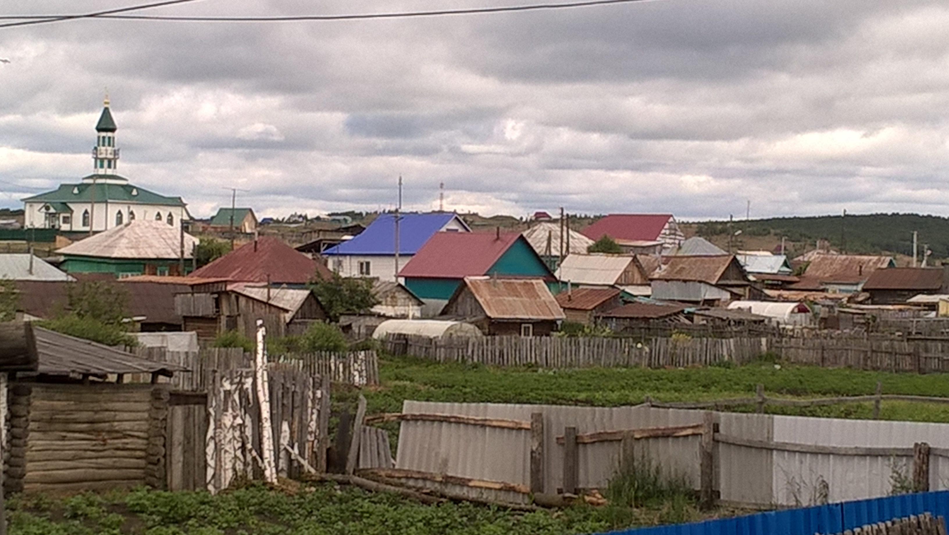 Учалы